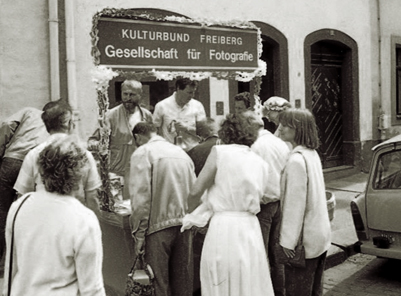 Verkauf von Bildmappen während des Bergstadtfestes in Freiberg, 1988. Fotograf: Gunther Galinsky.